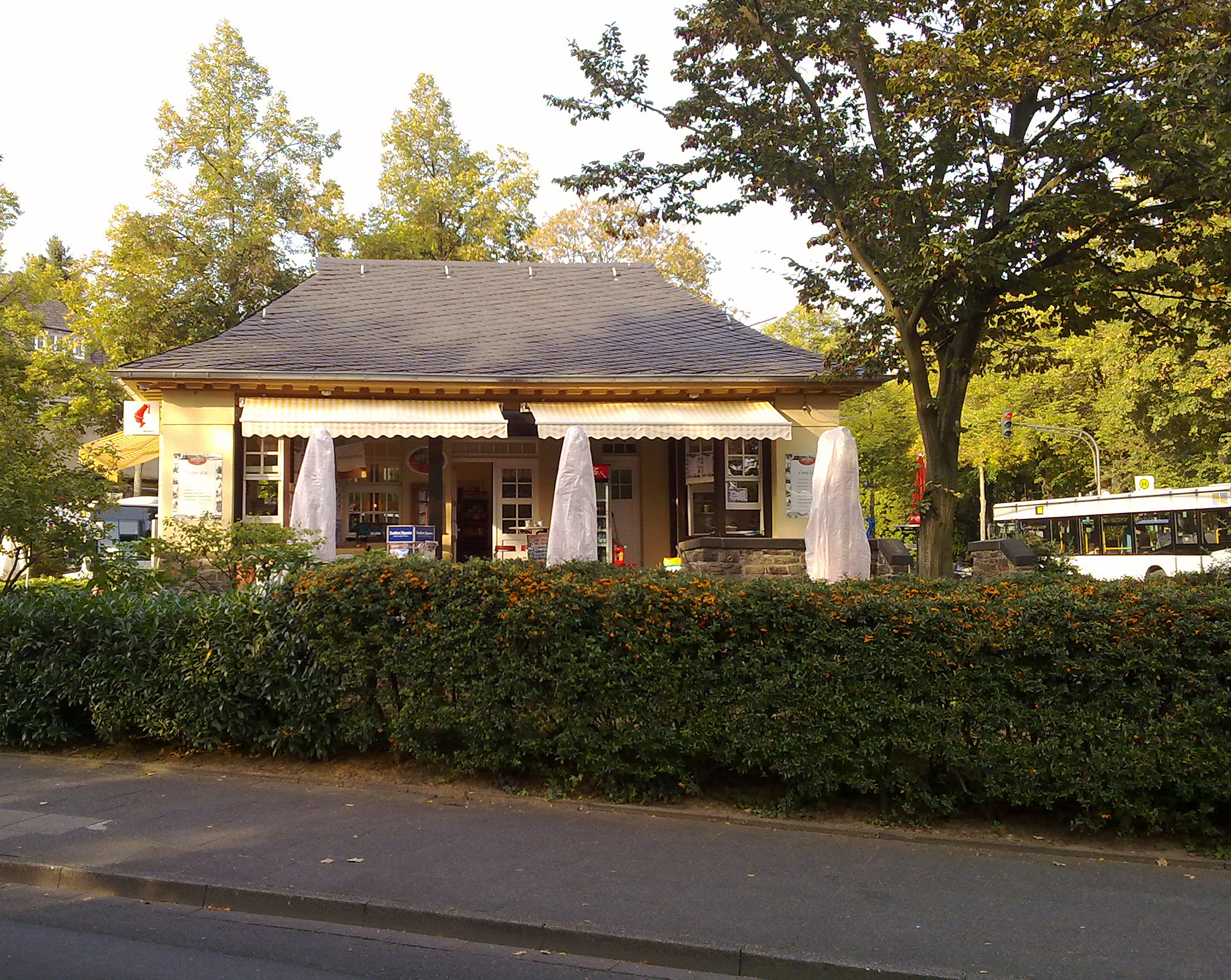 ehemalige Wartehalle der Straßenbahnlinie GM (Rheinallee 1a) in Bad Godesberg, Ortsteil Godesberg-Villenviertel